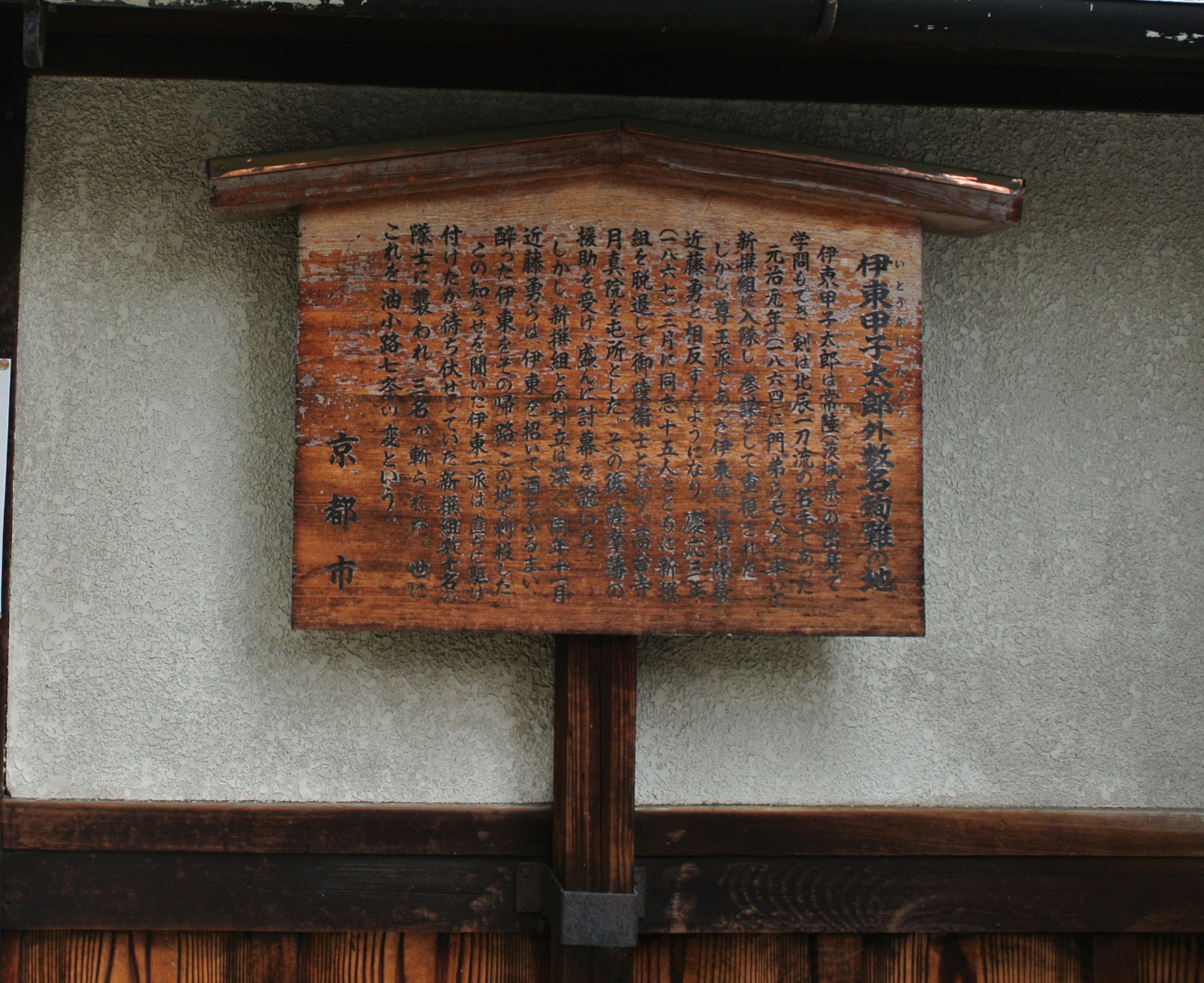 油小路事件の現場・本光寺前